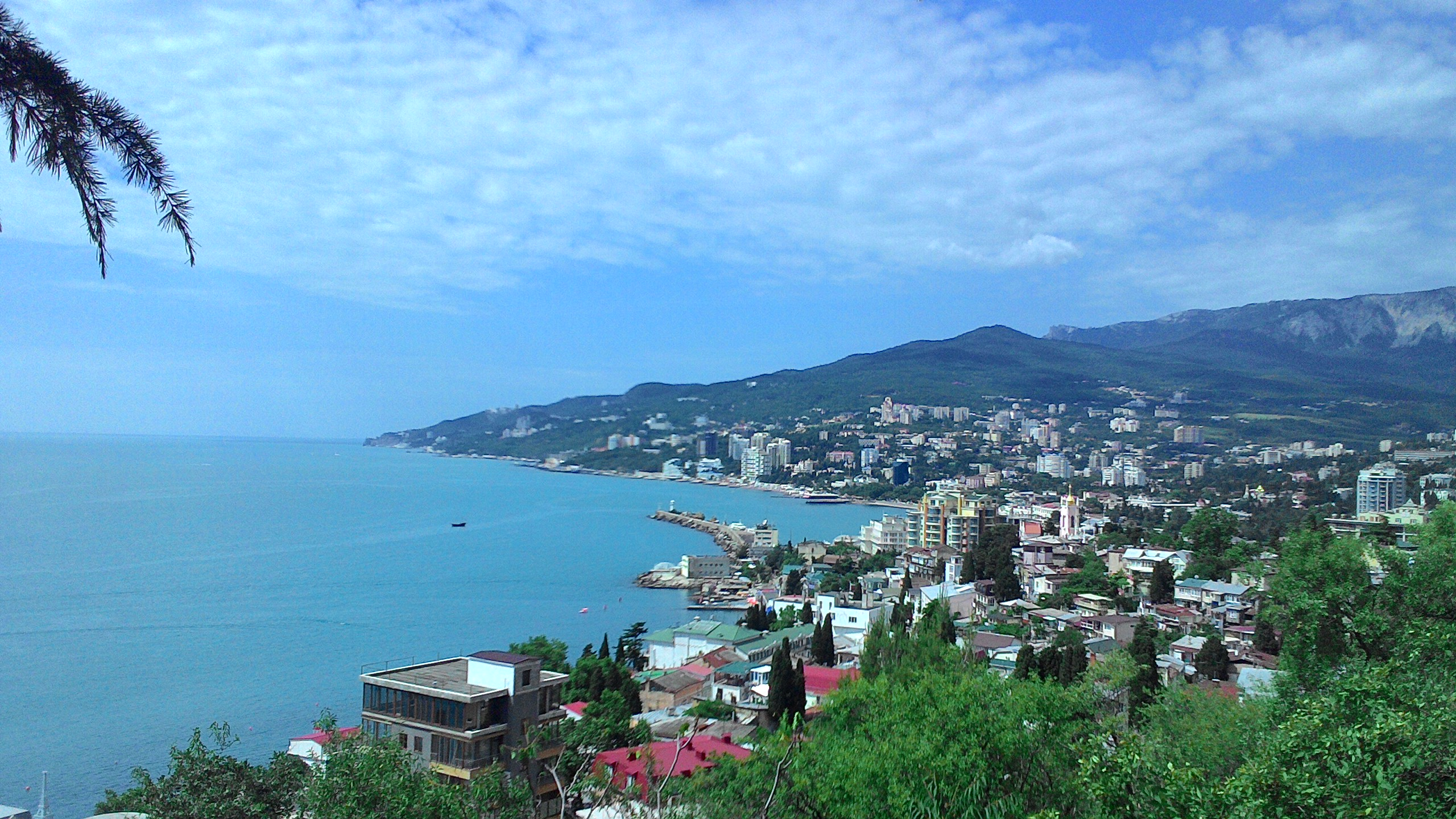 Ялта, вид от Поликуровского мемориала